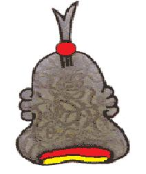 Escudo del municipio de Jonacatepec, Morelos.